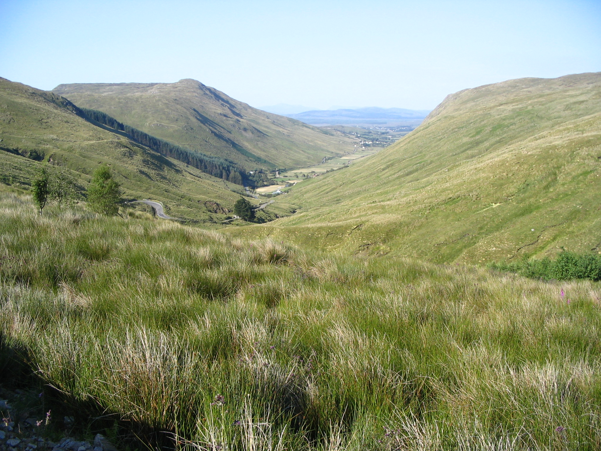 Glengesh Pass - vue depuis le sommet du col en direction d'Ardara à l'est.